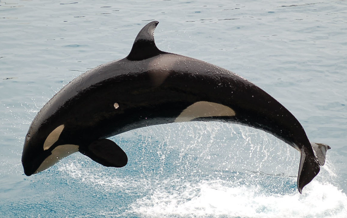 Jumping Orca